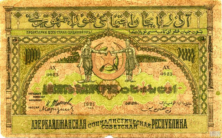 10 000 рублей, Азербайджанская ССР, 1921, аверс.